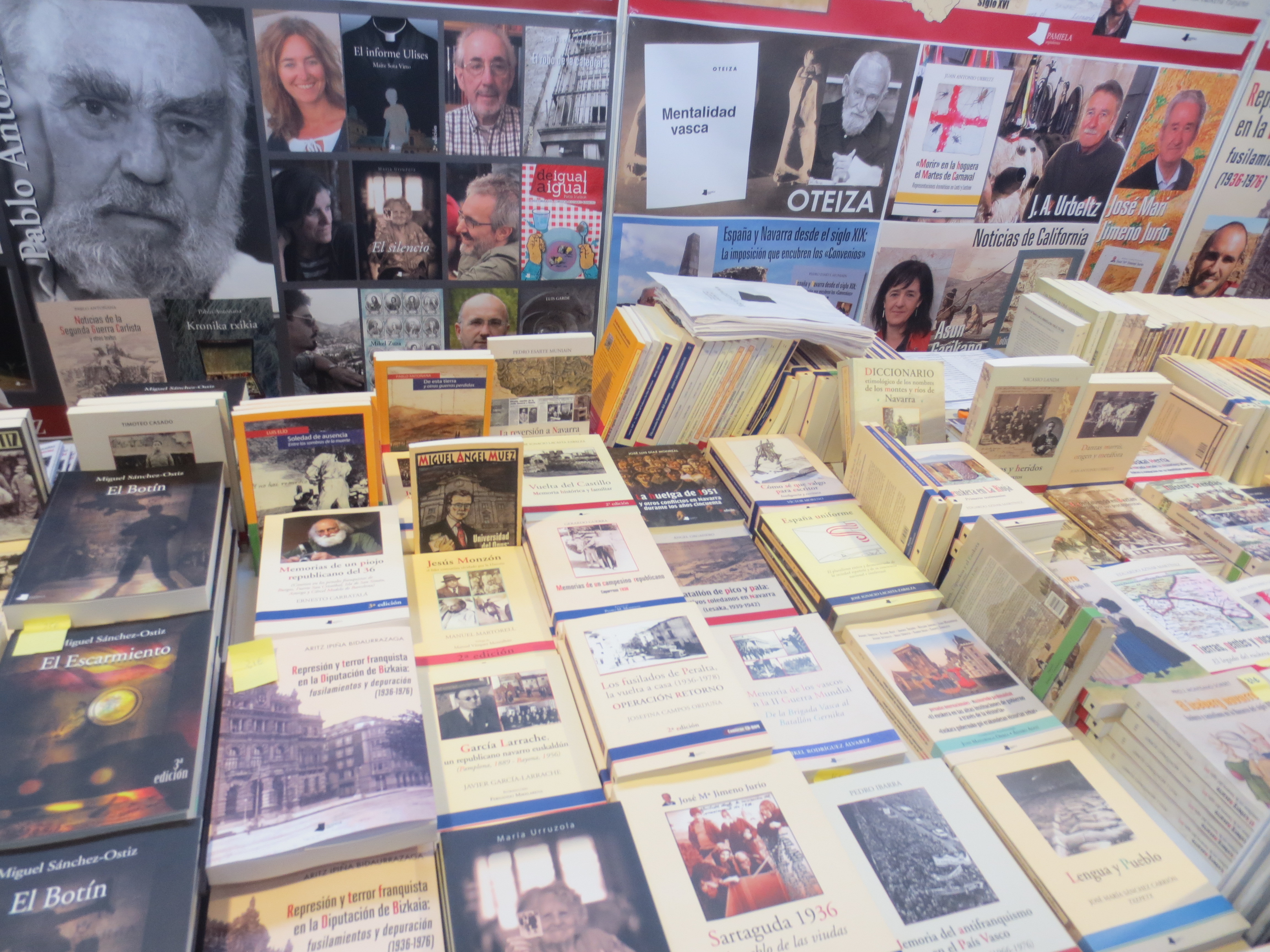 Pamiela argitaletxeko ale batzuk Durangoko azokan. 2017.